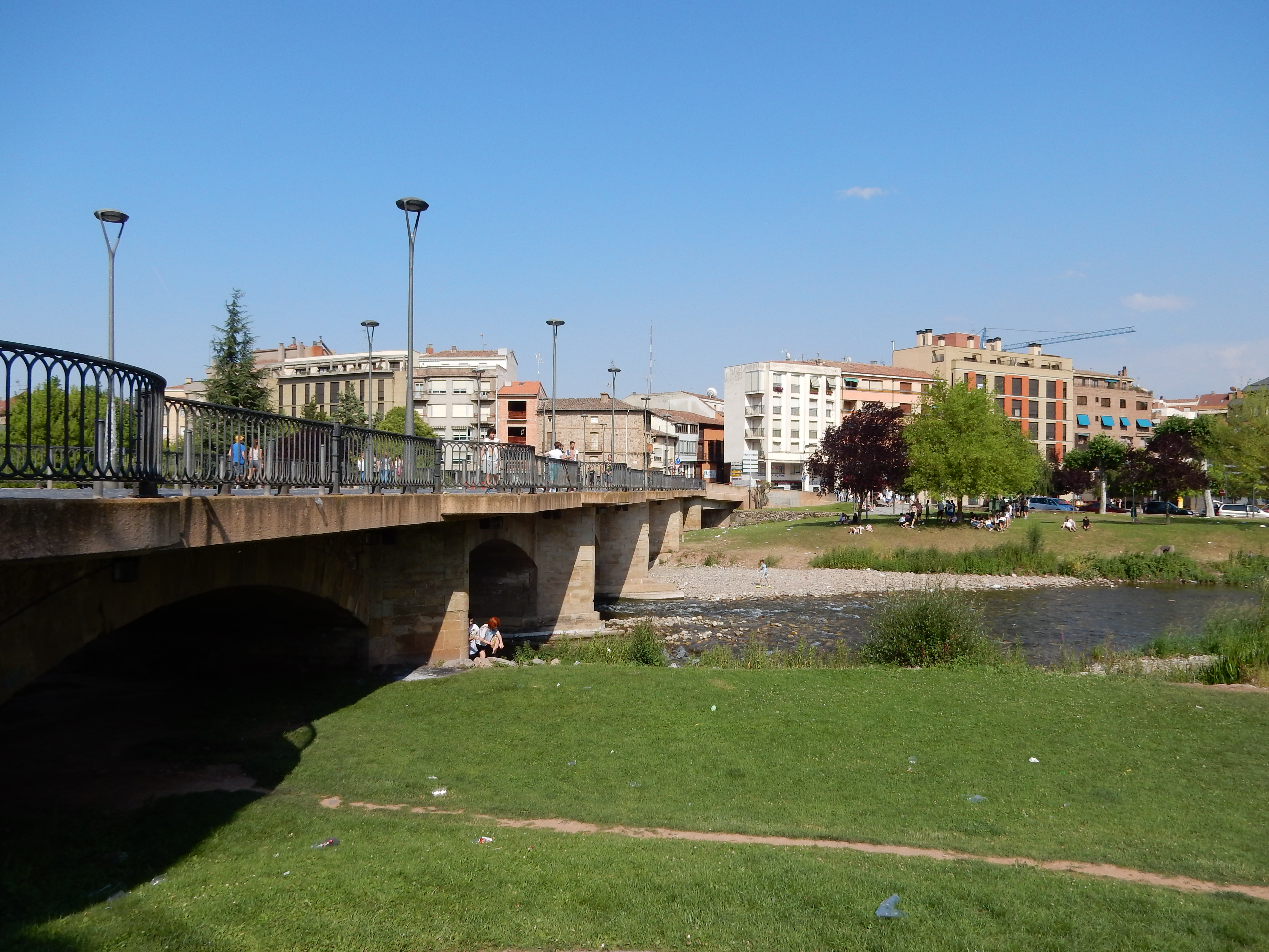 Ponte sul fiume Najerilla